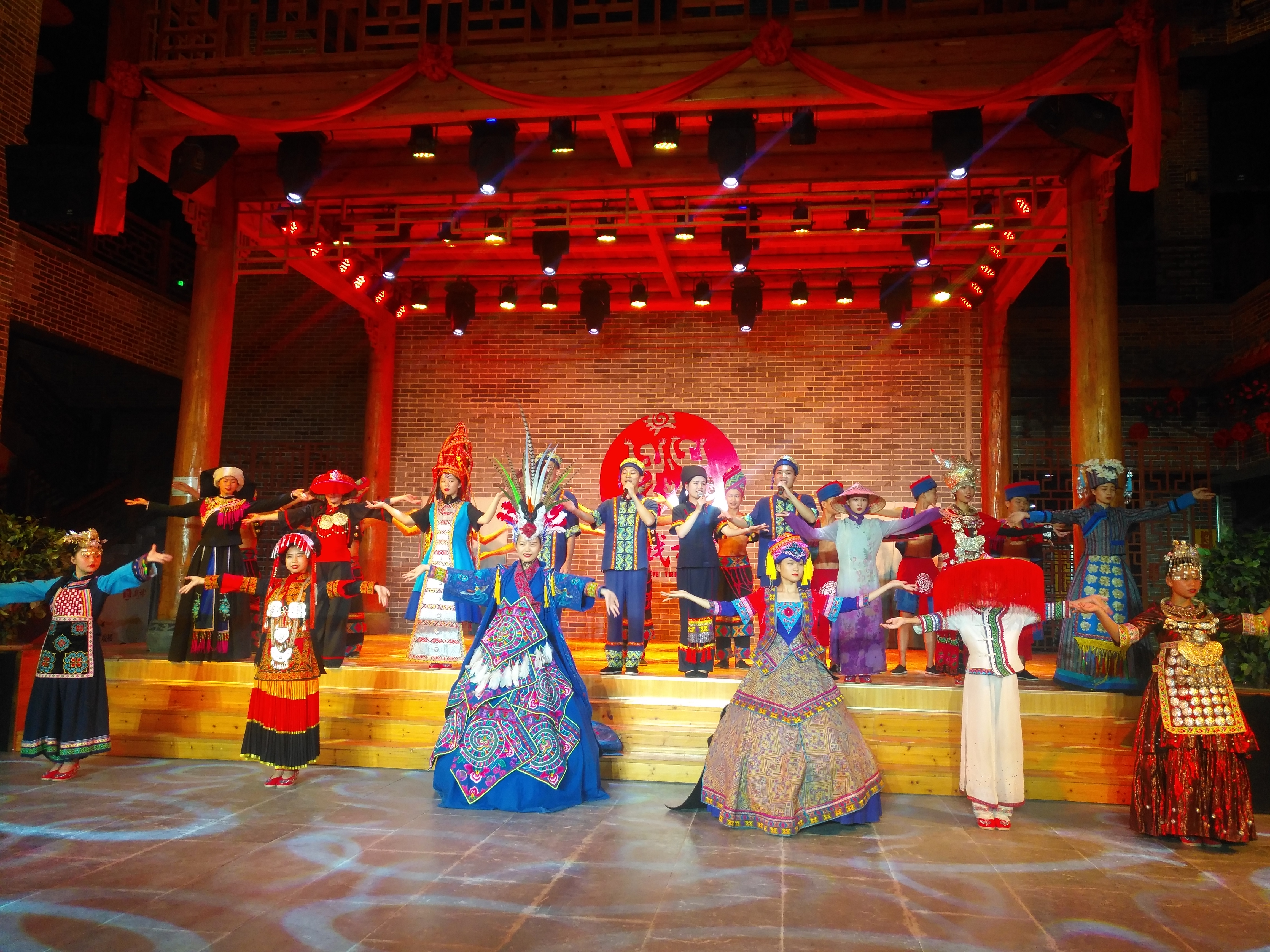 2018.08.26，广西“桂秀”少数民族非遗文艺展演在阳朔戏楼隆重举办，图为全体演员联合压轴公演。